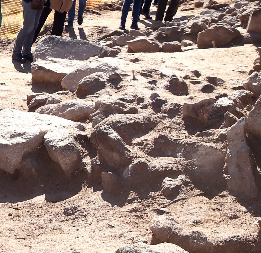 Marta García visita las obras de recuperacion del Cerro del Bú